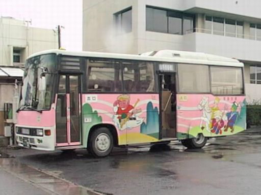 Nara Kotsu Hino P-CH160AA at Nara City